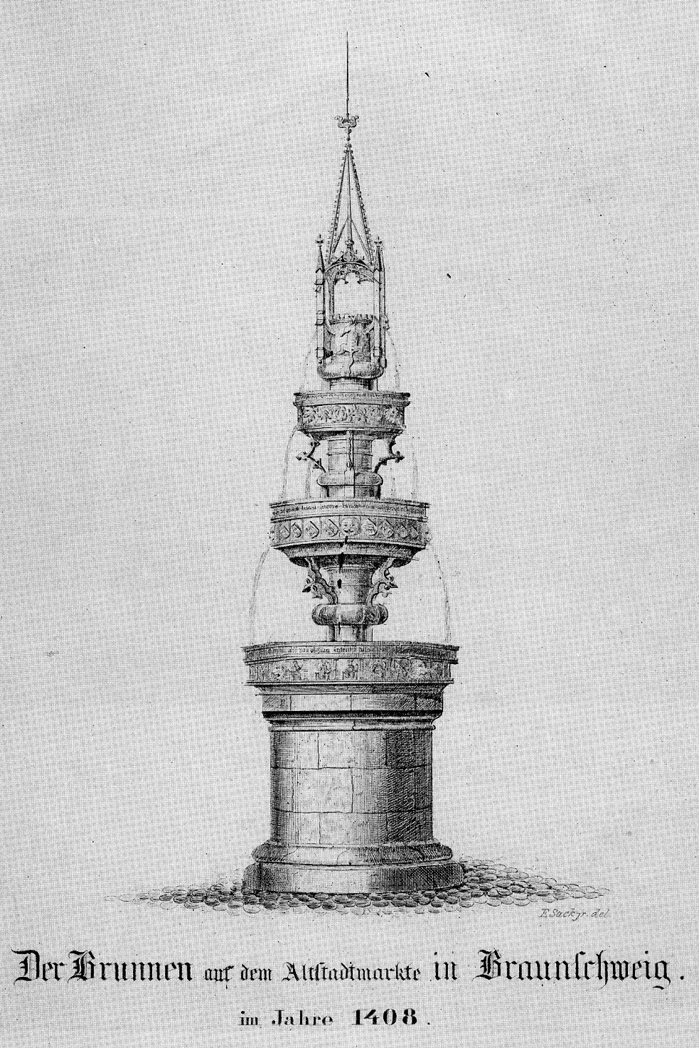 Braunschweig: Lithografie von Carl Wilhelm Sack von 1841: Der Brunnen auf dem Altstadtmarkte in Braunschweig im Jahre 1408. Braunschweig, Germany: Lithography by Carl Wilhelm Sack from 1841: The fountain in the Old Town Market Square in Braunschweig in 1408.